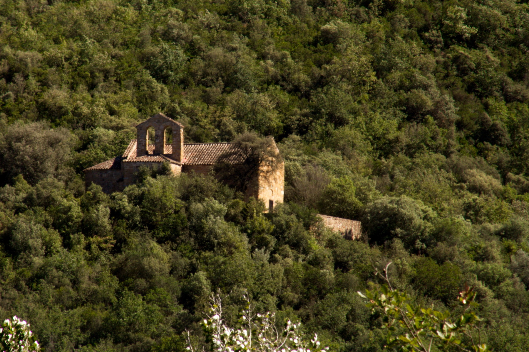 Església de Sant Cebrià de Cabanyes (Sant Fost de Campsentelles)